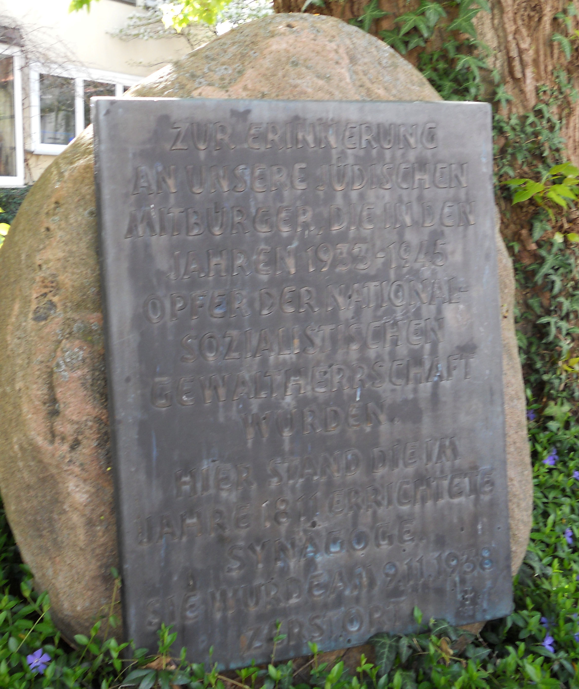 Gedenkstein zur Erinnerung an die Judenverfolgung während des dritten Reiches in Werl, der Stein steht am Synagogenplatz in Werl